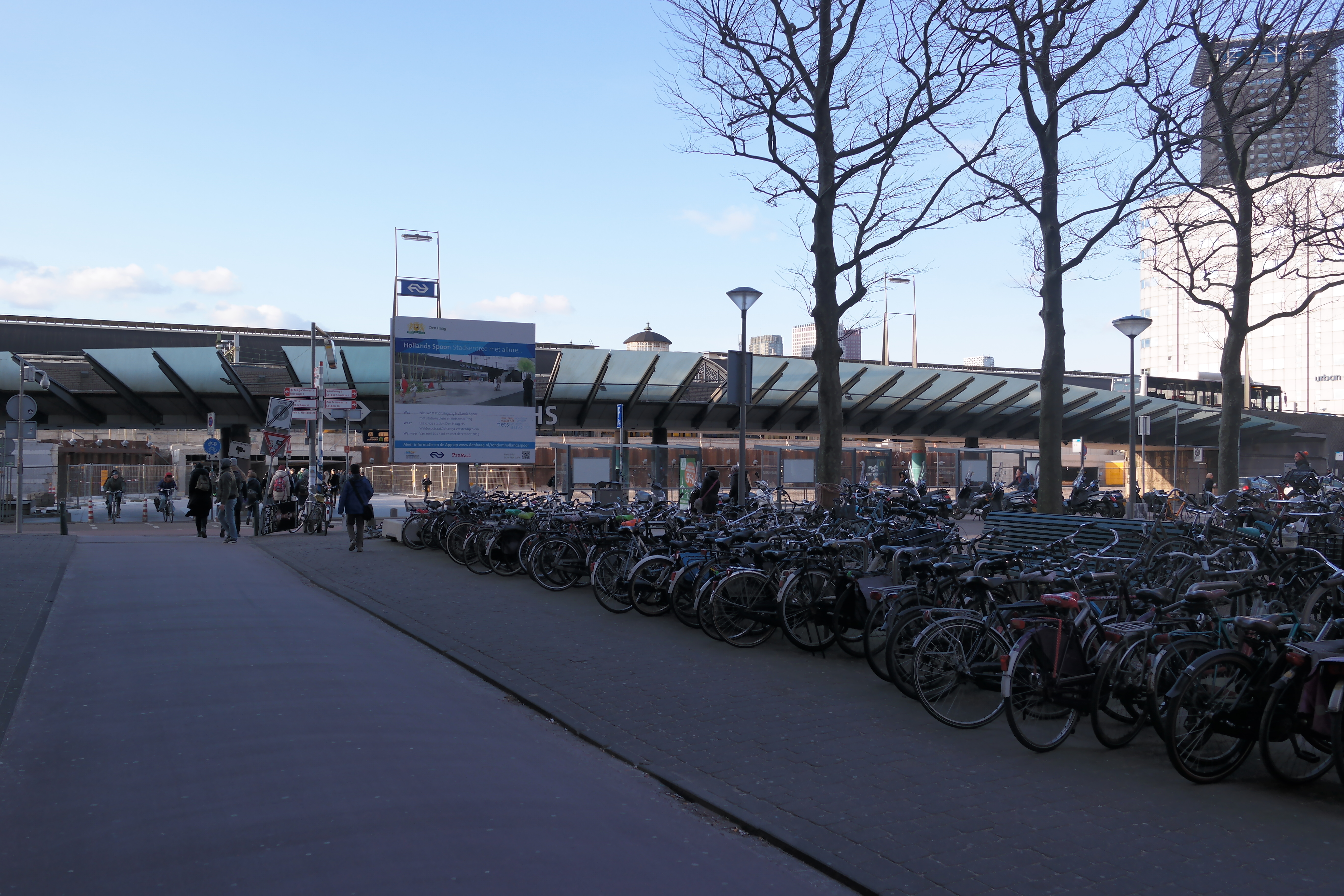 Bebouwing aan de Haagse Waldorpstraat.